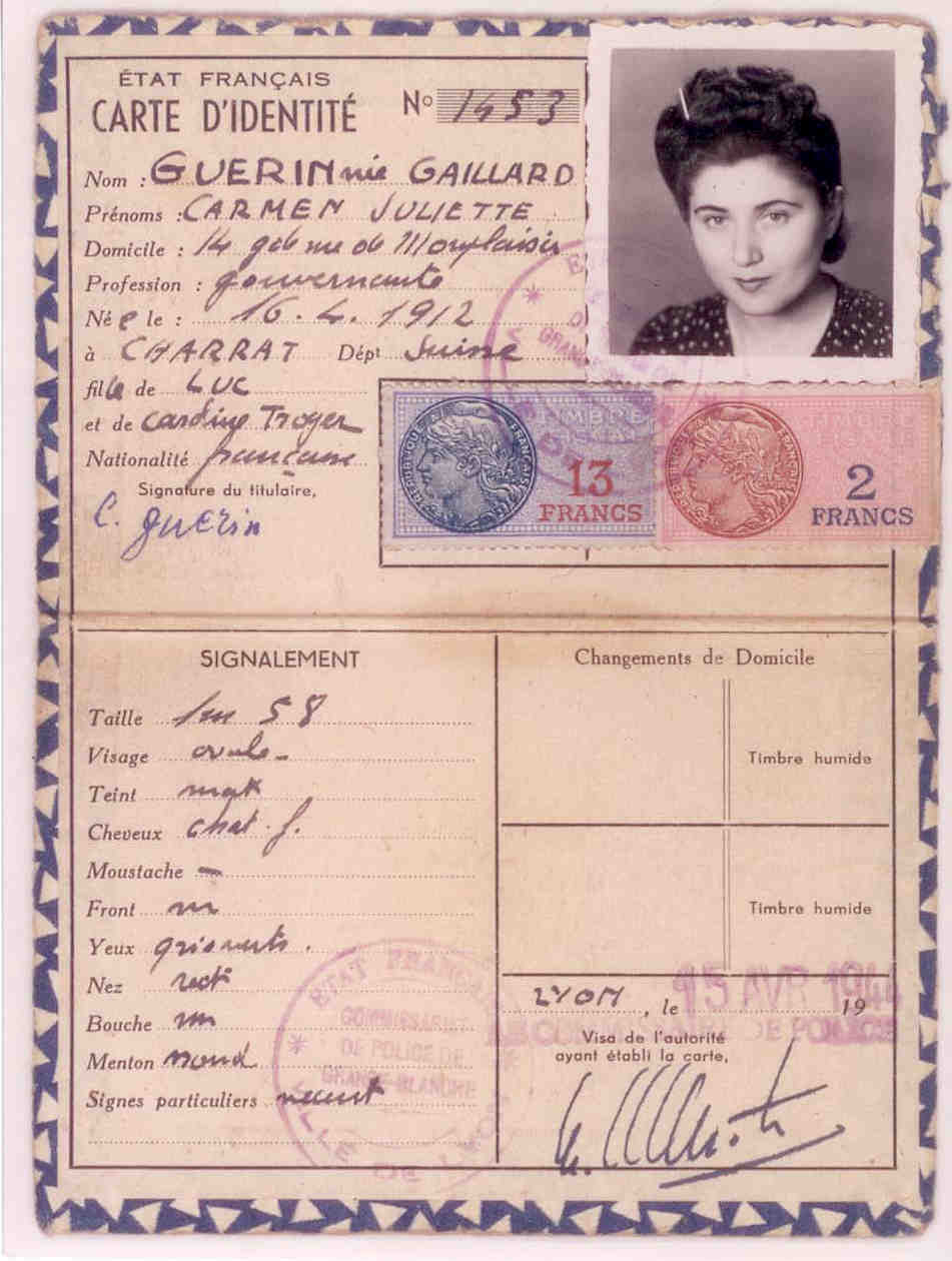 Fausse carte d'identité d'Esther Gorinsztejn, future actrice de cinéma sous le nom d'Esther GORINTIN.